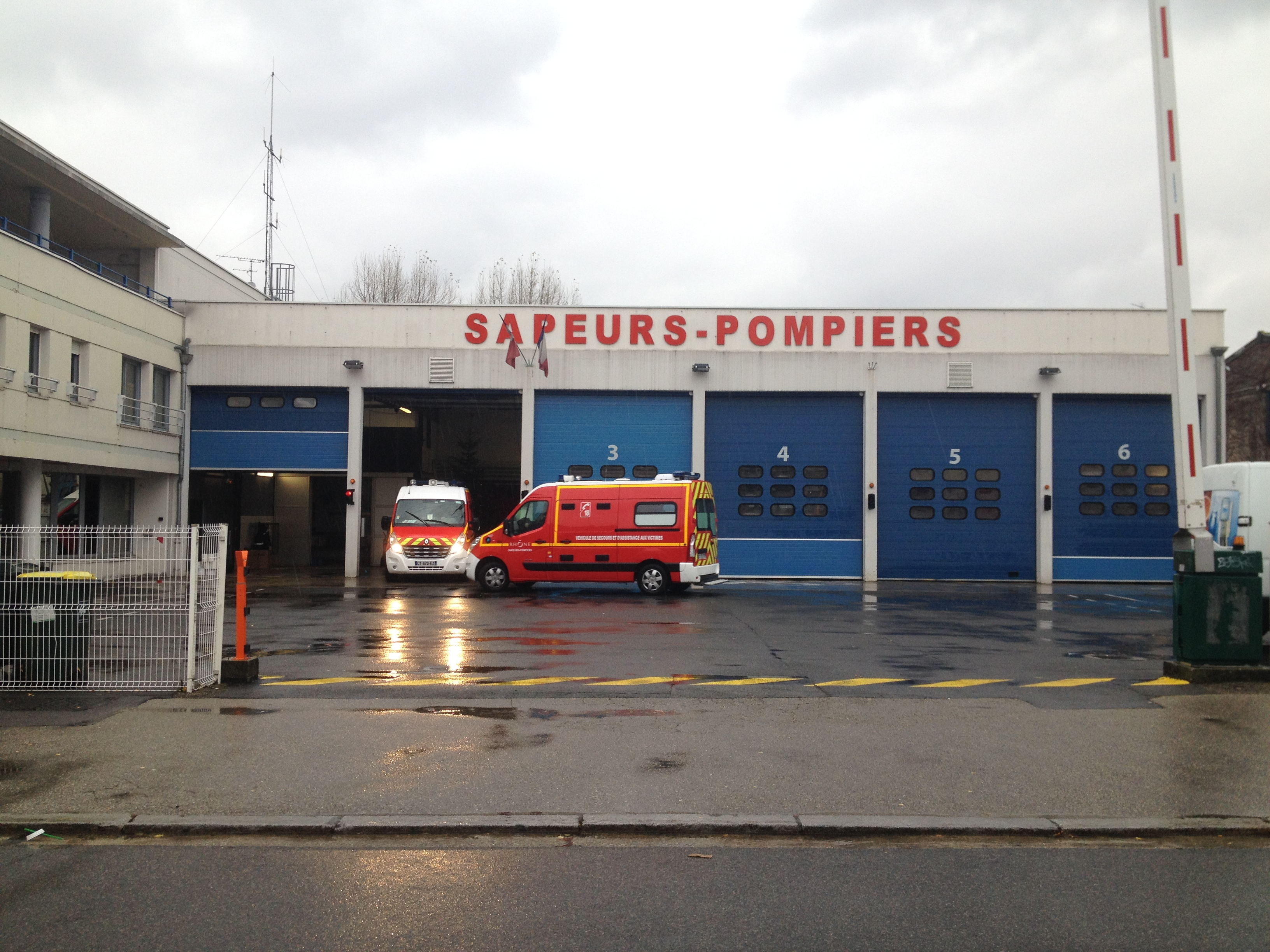 Une caserne des pompiers à Villeurbanne.